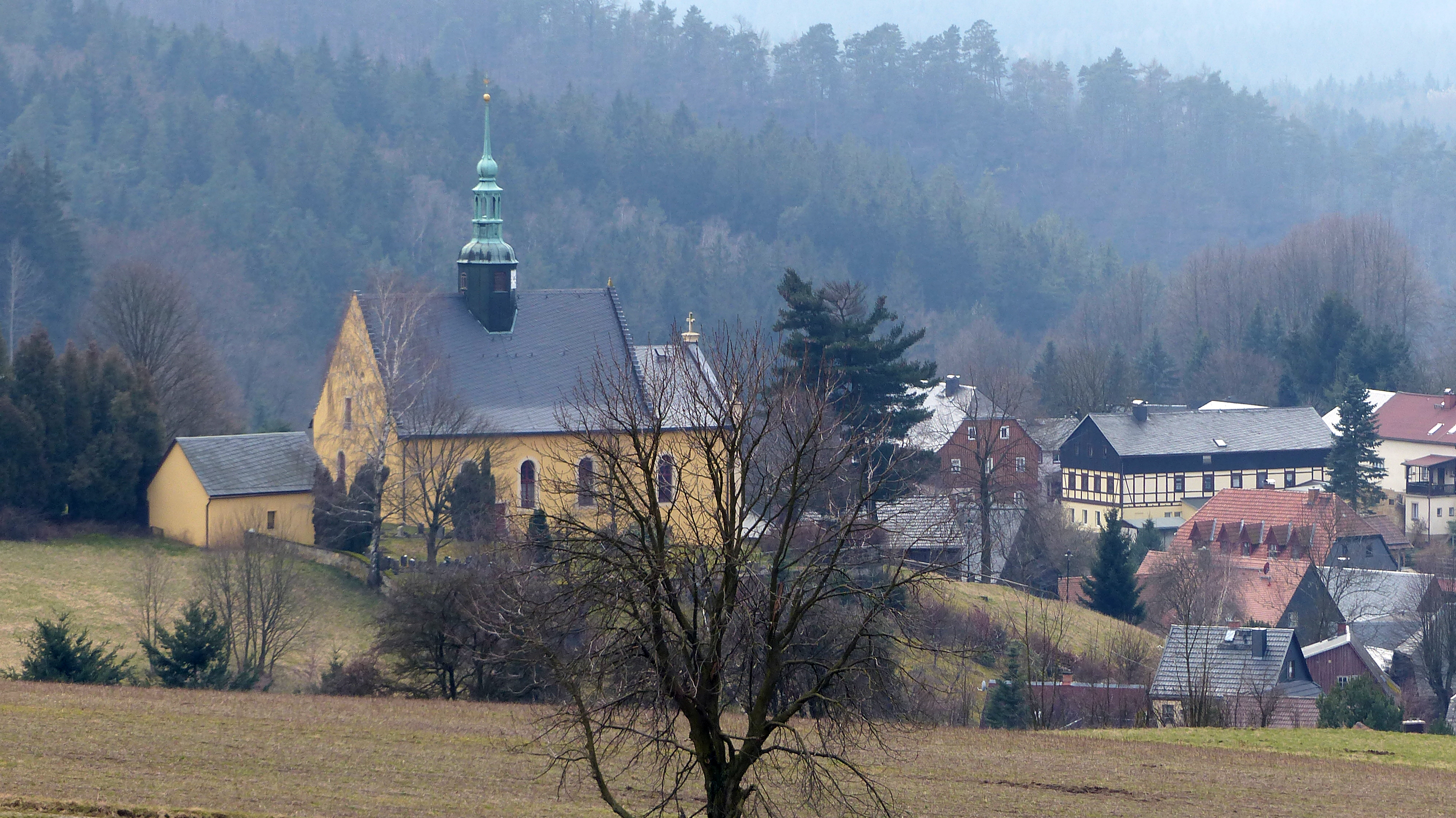 Blick auf Hinterhermsdorf von der Emmabank aus, nahe dem Weifbergturm - Denkmalschutzgebiet Hinterhermsdorf.